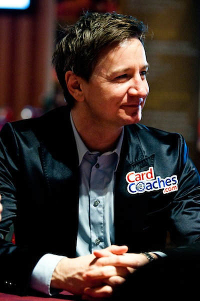 Markus Golser bei der Pressekonferenz von in Wien